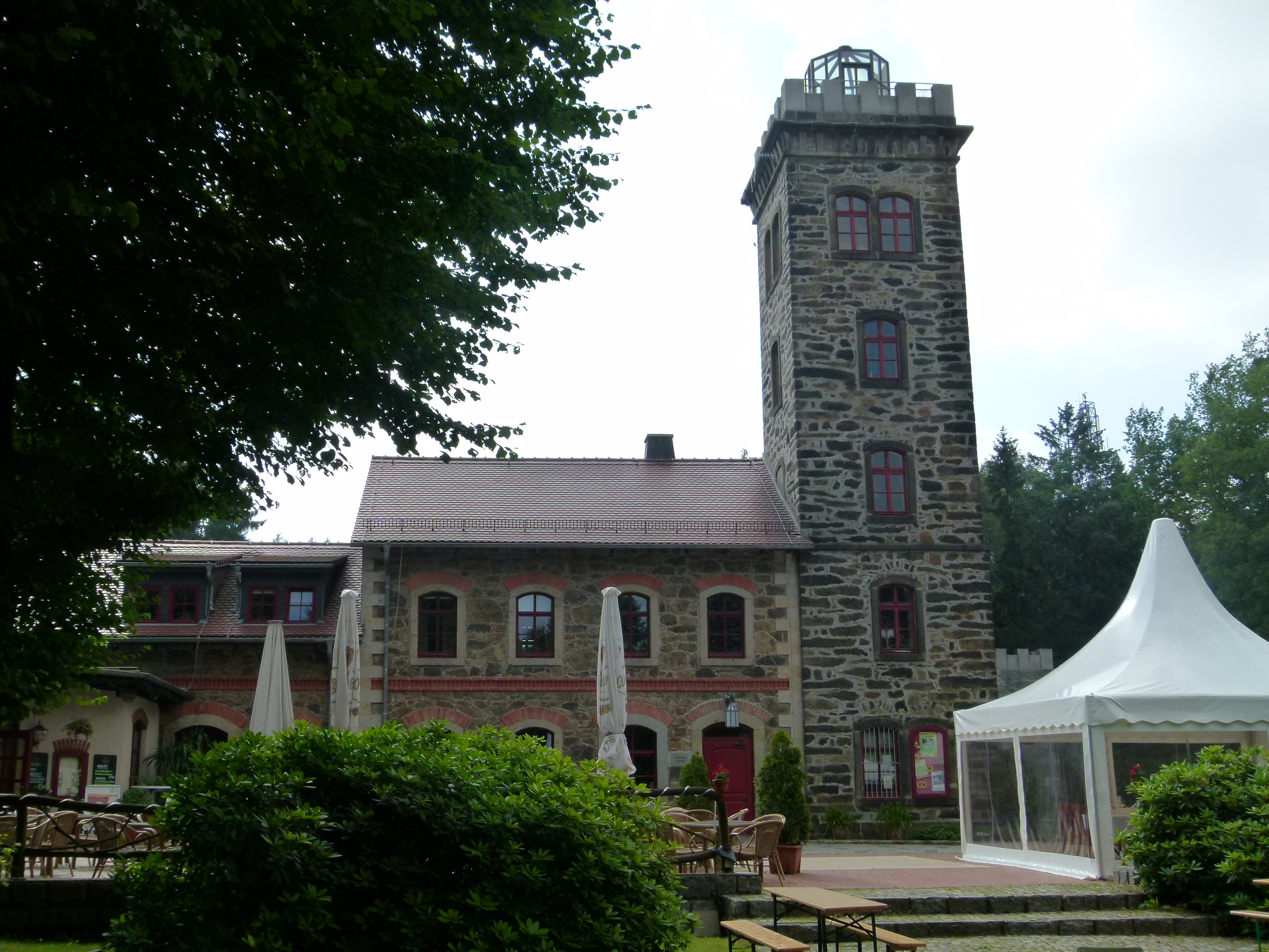 Denkmalgeschütztes Gebäude auf dem Butterberg bei Bischofswerda, Sachsen